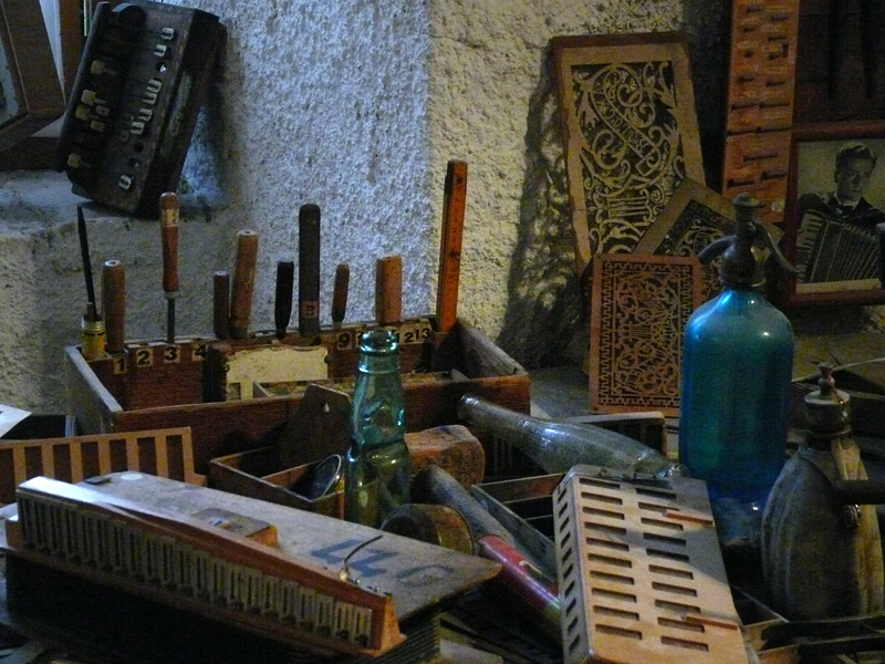 Museo internazionale della Fisarmonica, workbench detail